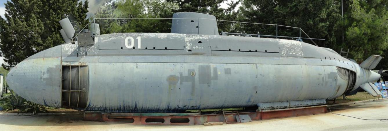 P-01 Velebit u Lori.